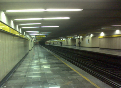 Andenes de la estación Terminal Aerea de la linea 5, metro del Distrito Federal